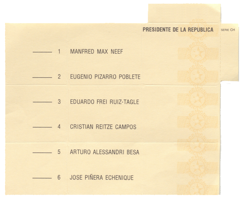 Papeleta de votación usada en las elecciones presidenciales de Chile de 1993.